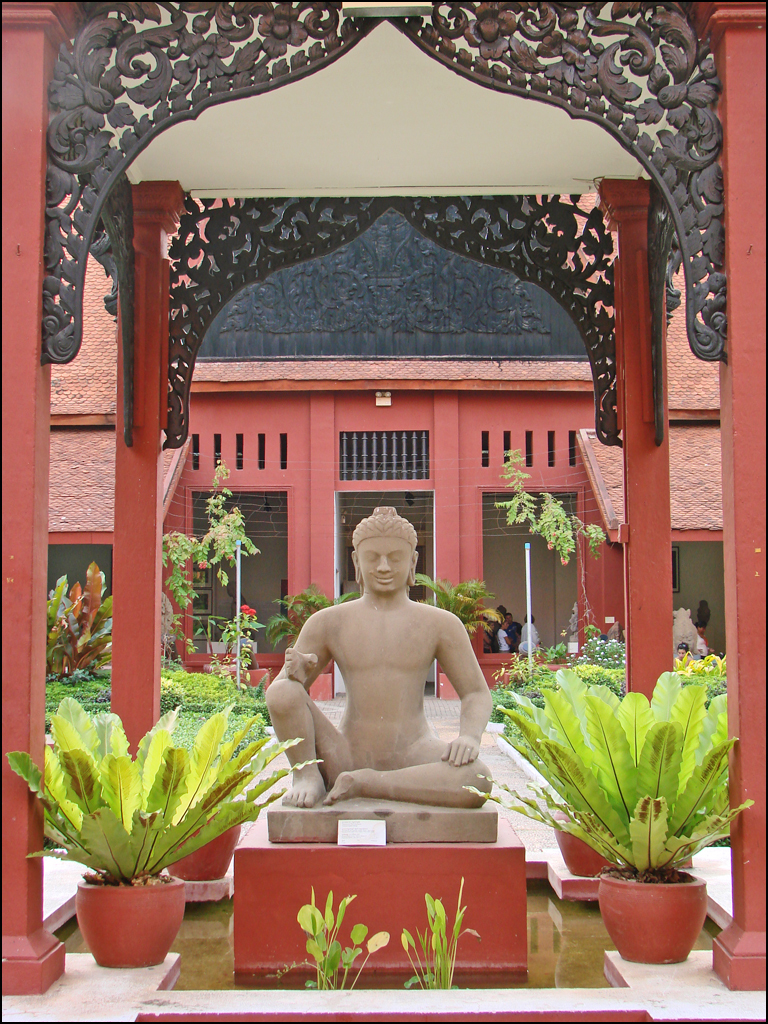 Le "Roi lépreux" provient d'Angkor Thom, il date du XIIème siècle et est sculpté dans du grès gris beige. Il est placé dans la cour intérieure du musée où il est permis de photographier. "La célébrité de cette oeuvre est liée au mystère qu'elle inspire" (catalogue p180) Le corps est nu ce qui est inhabituel dans la statuaire khmer et son identification reste incertaine. Il pourrait s'agir de la figure de Yama, le dieu de la mort et le juge suprême. La monture de Yama est un buffle. Une tradition locale a assimilé cette statue au fondateur d'Angkor Vat : Bua-Sivisithiwong qui selon la légende était lépreux. Fondé par Georges GROSLIER , le musée a été inauguré le jour de l'an khmer 1920 sous le nom de Musée Albert Sarraut, par le roi Sisowat et le Résident Supérieur Baudoin, il est dédié à l'art khmer. Il est devenu en 1952 le musée national du Cambodge. voir le site de l'auteur réalisé en 2003